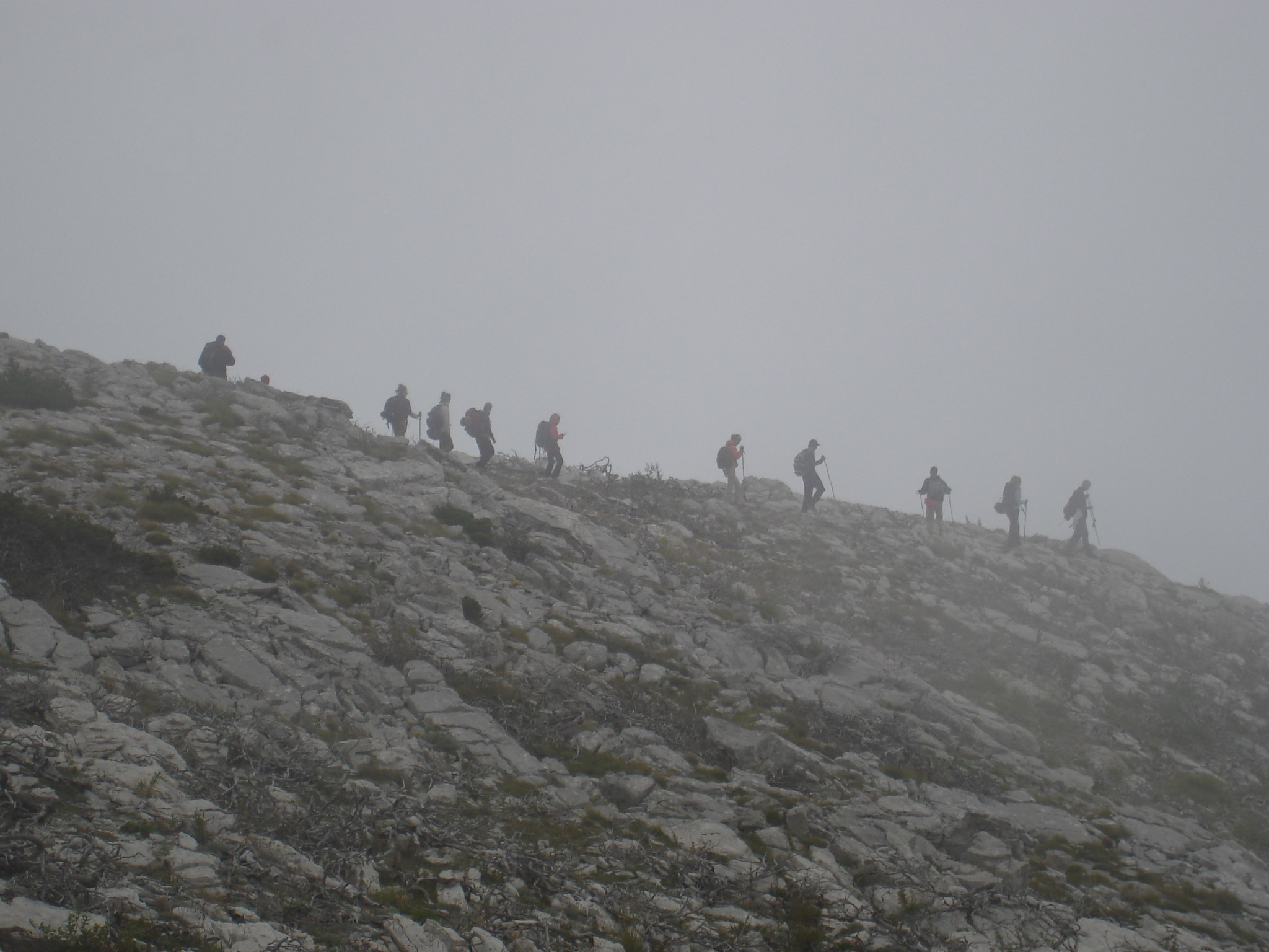 A group of mountaineers approaching the summit of mountain Dinara, Croatia.